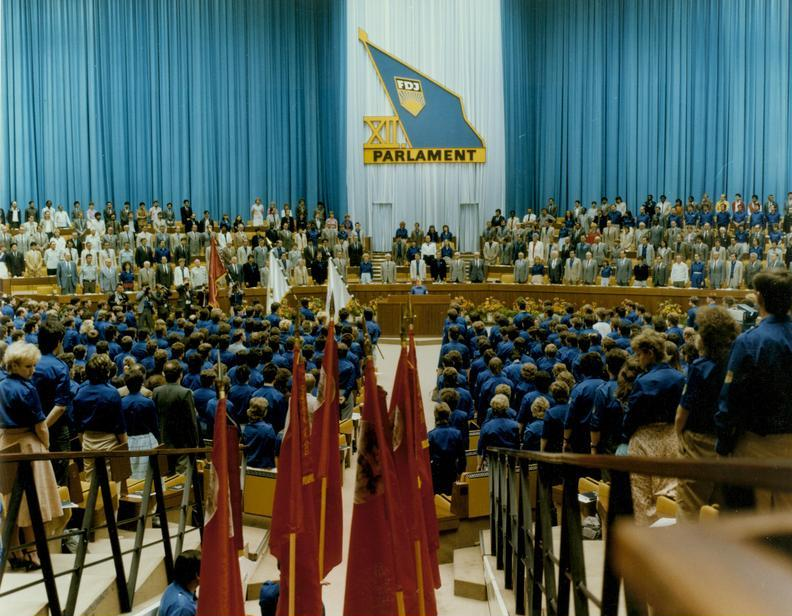 ADN-ZB/Schindler/21.5.85 Berlin: XII. Parlament der FDJ Während der Eröffnung im Großen Saal des Palastes der Republik.